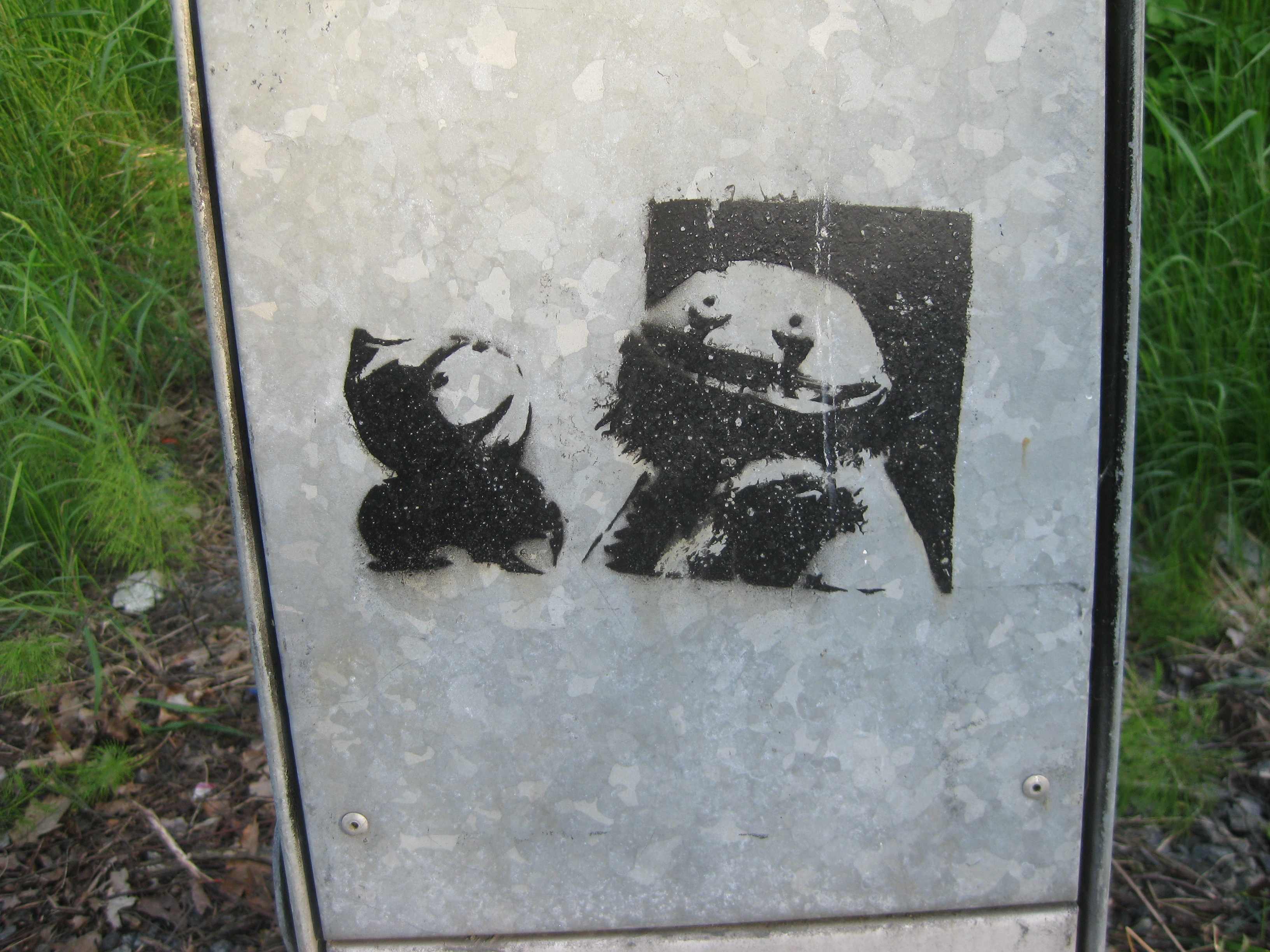 En sprayad schablon föreställande Allram Eest (till höger) och Tjet (till vänster). Schablonen är sprayad på ett elskåp i Mölnlycke.